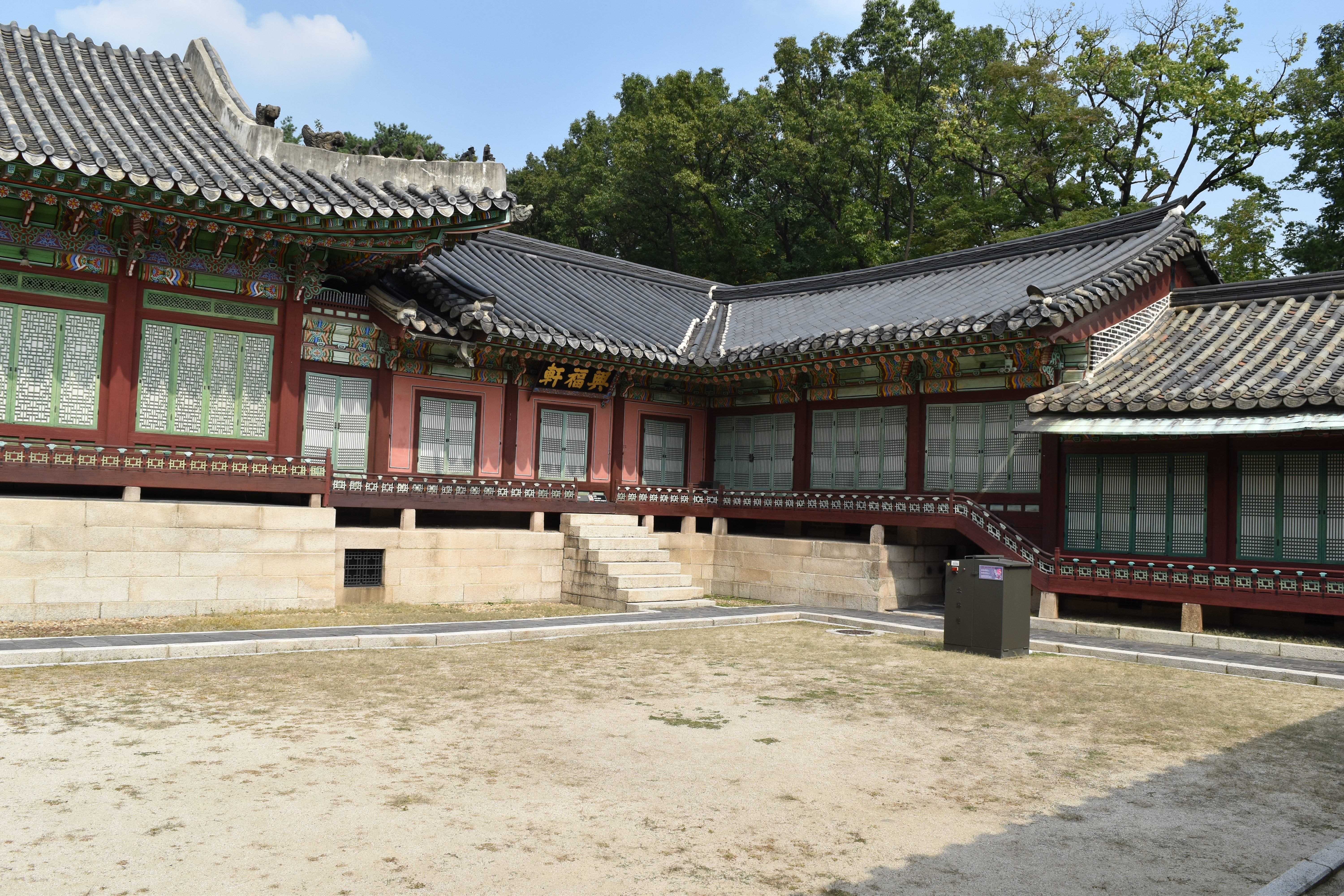 창덕궁 흥복헌. 경술국치 당시 마지막 어전회의가 열린 곳이다.